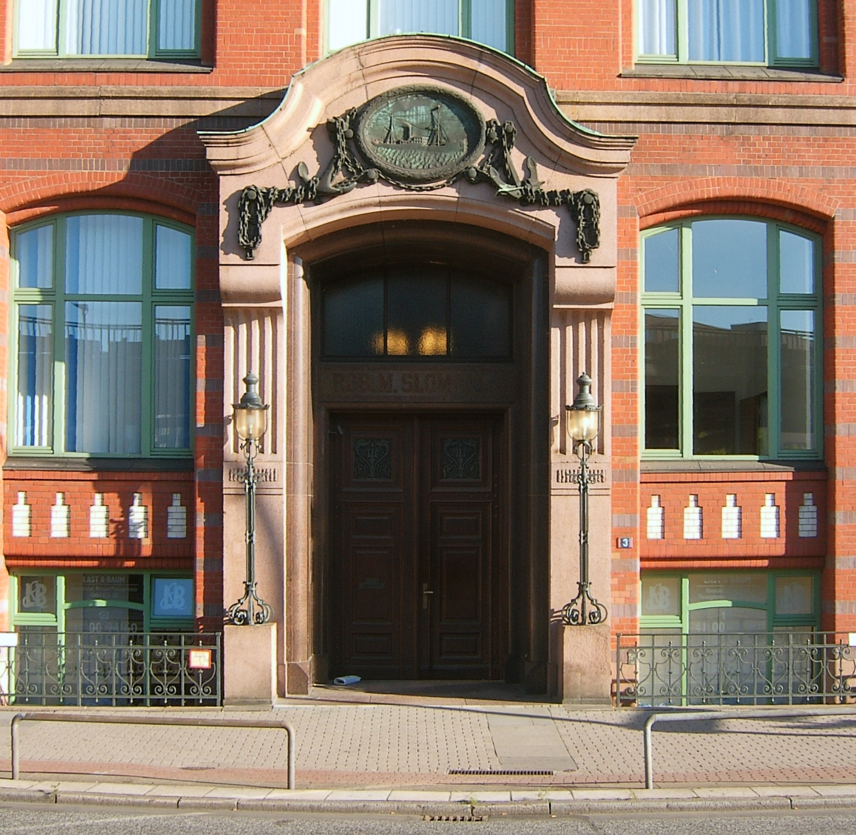 Hamburg, Neustadt, Slomannhaus